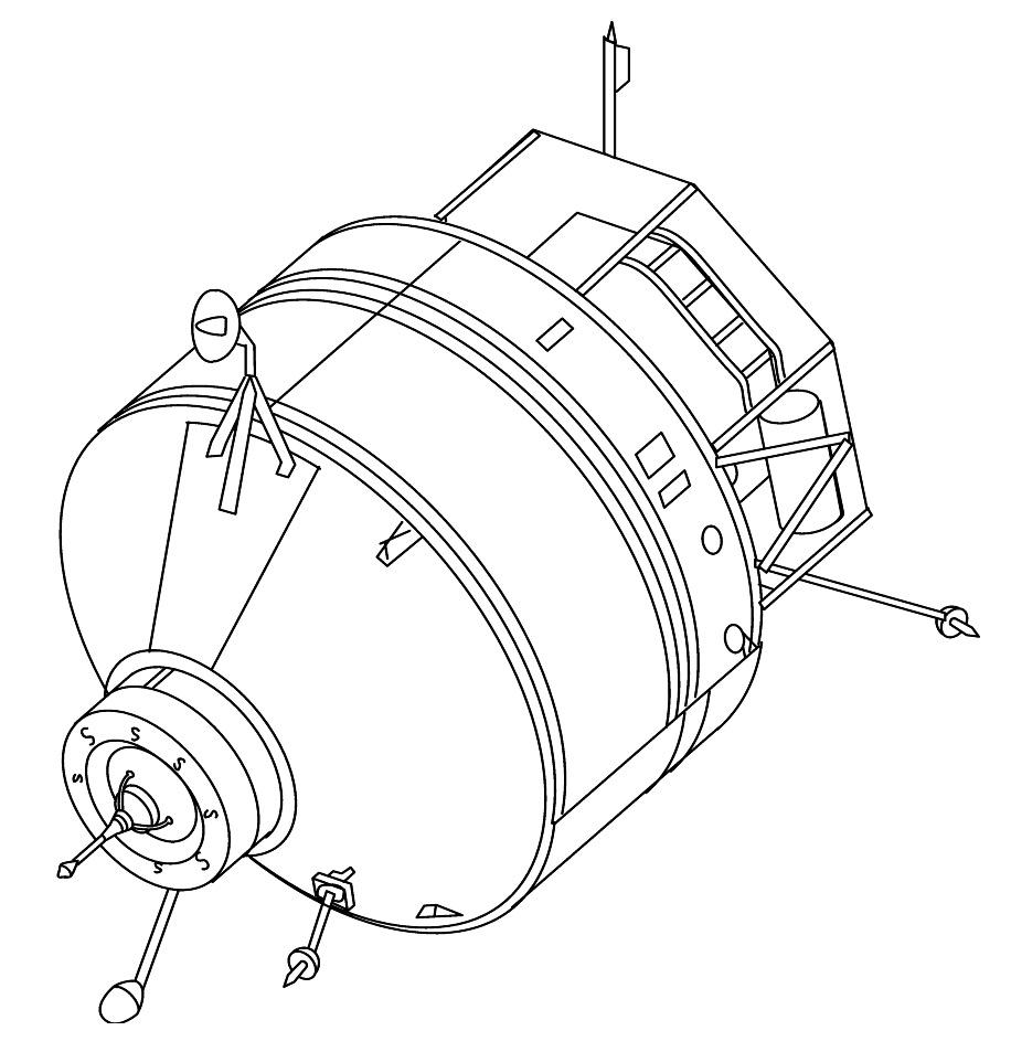 Kvant module.